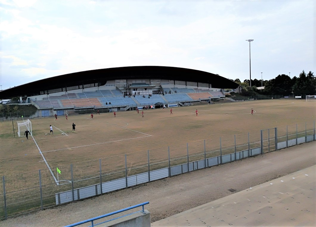 Vue générale du stade Michel Amand situé à Buxerolles, dans la proche banlieue de Poitiers (86000, France), le 21 septembre 2019